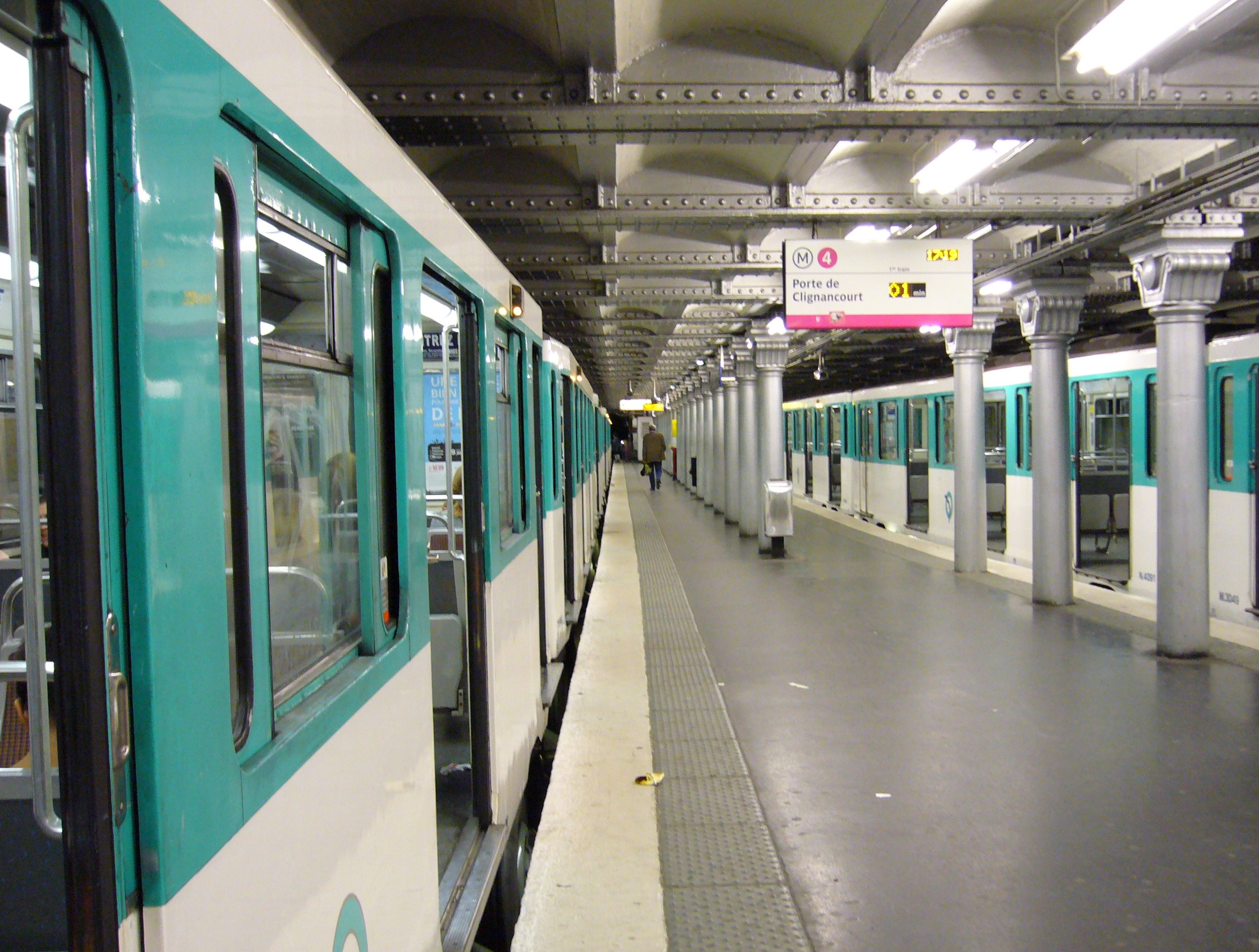 Quai central de la station Porte d'Orléans de la ligne 4 du métro de Paris.